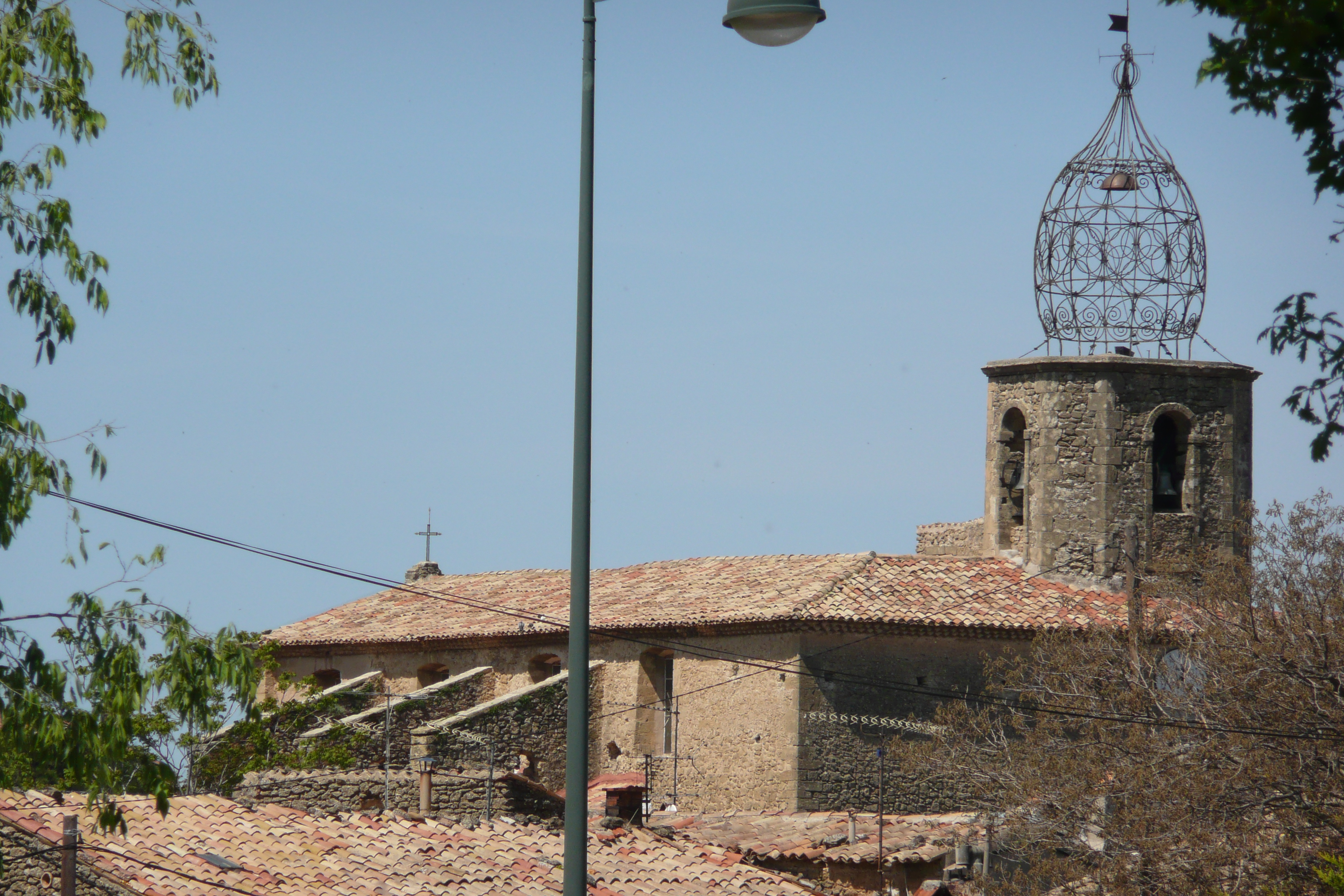 Eglise à Lauris.